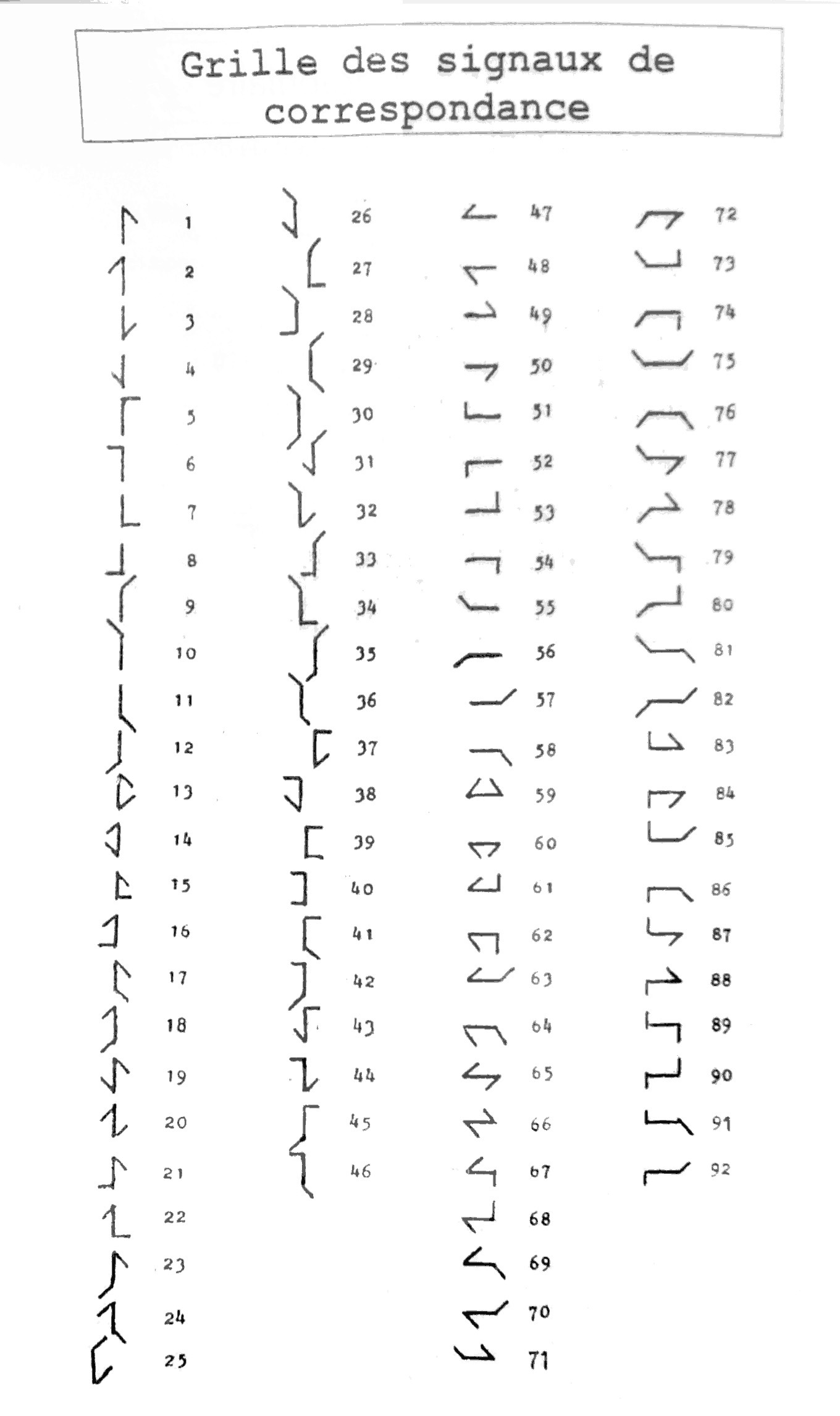 Télégraphe de Chappe, grille des signaux de correspondance, musée de Saint-Marcan